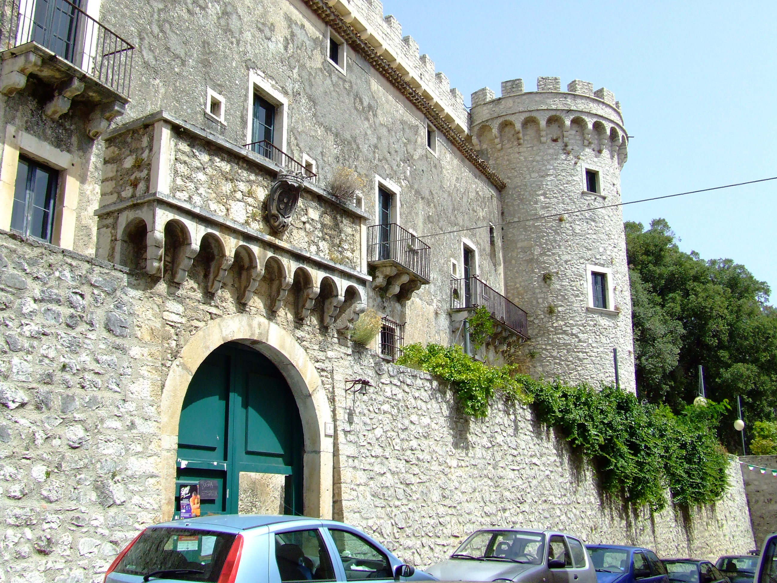 Portale di ingresso del Castello Pignatelli